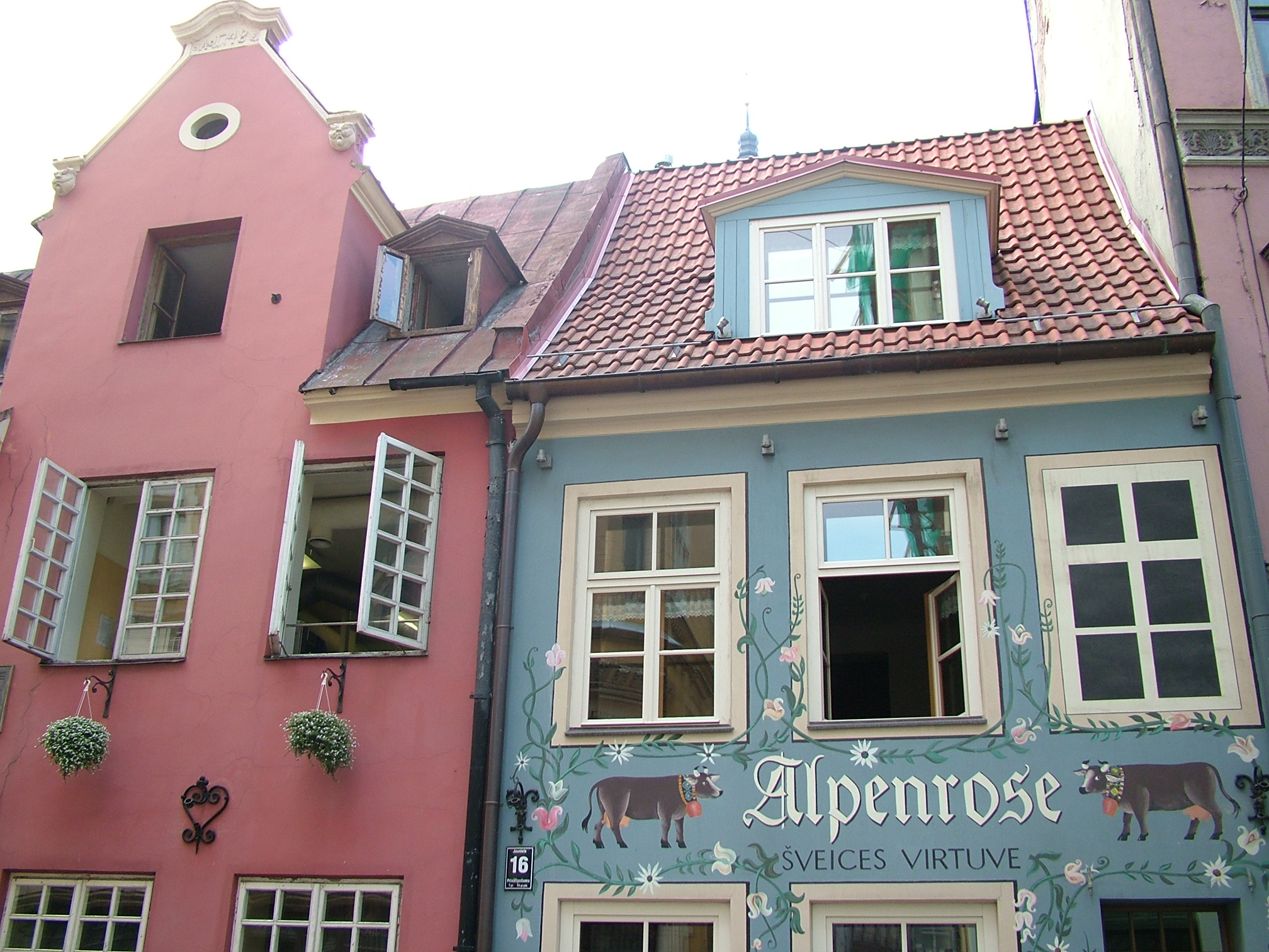 Building in Riga, Latvia.